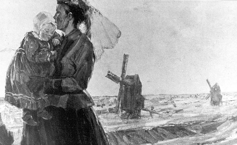 Original image description from the Deutsche Fotothek Windmühlen, Ausschnitt aus: Gemälde von H. Nadler/Gröden, aus: Heimatkalender Bad Liebenwerda, 1914